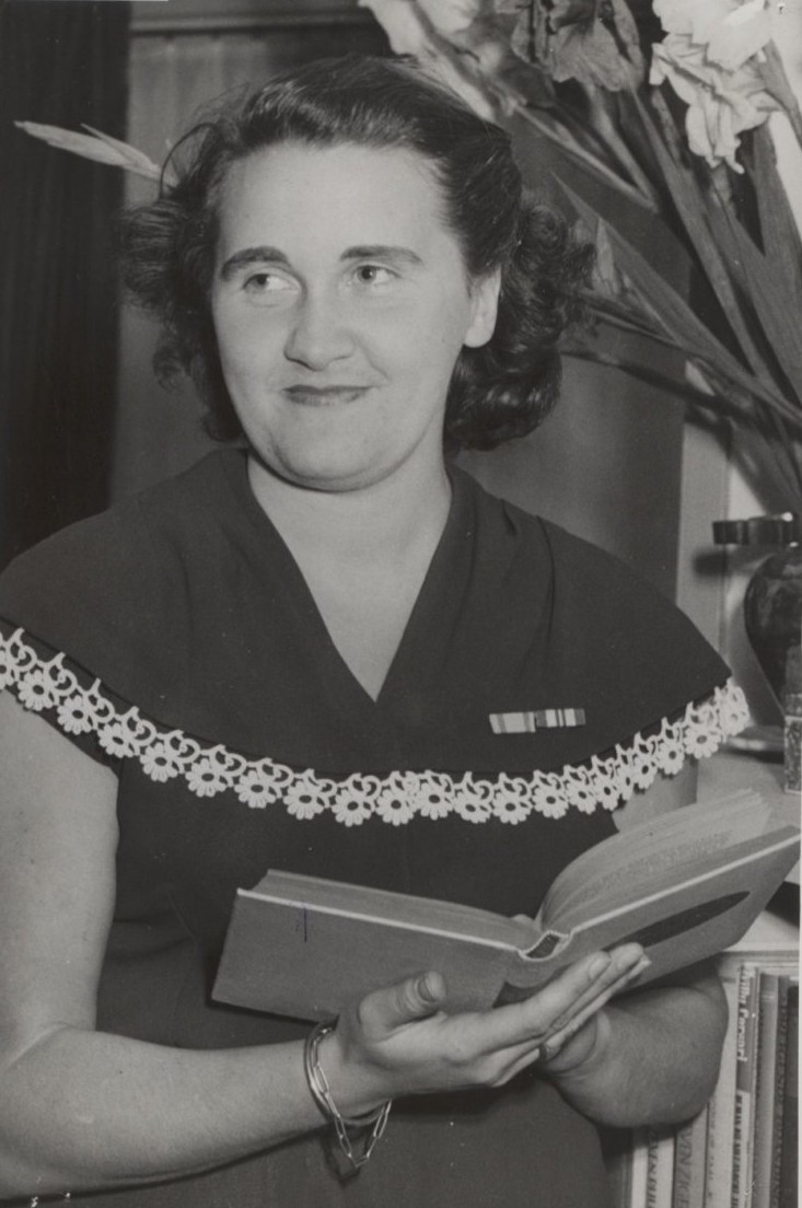 verzetsstrijders, fick gemmeke mw. Locatie: Wassenaar